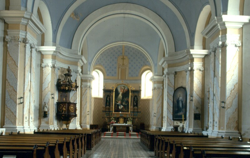 Bács, Szent Pál templom